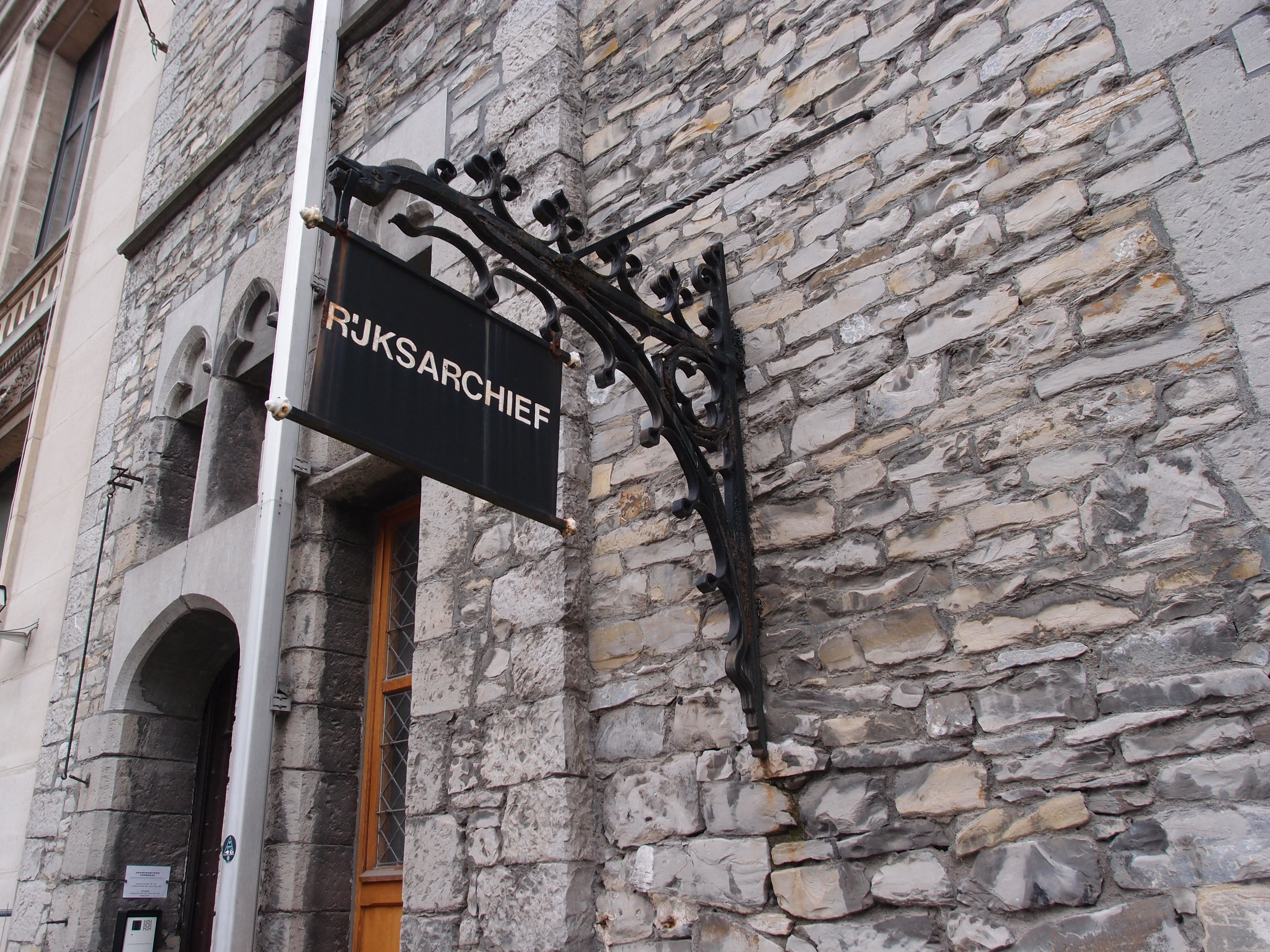 Burg G. de. Duivelsteen in Gent - Reichsarchiv Datum: 26.01.2014 Urheber: M. Pfeiffer alias Gordito1869 Quelle privates Fotoarchiv des Urhebers